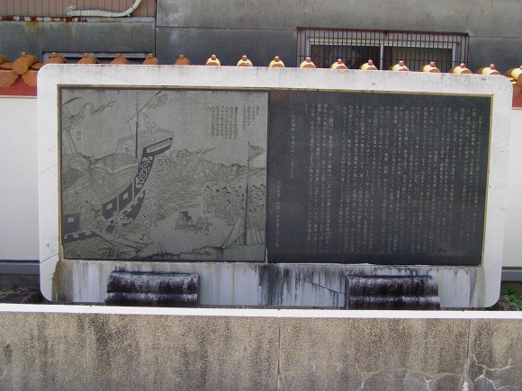 2005年8月1日徐福公園内で投稿者が撮影